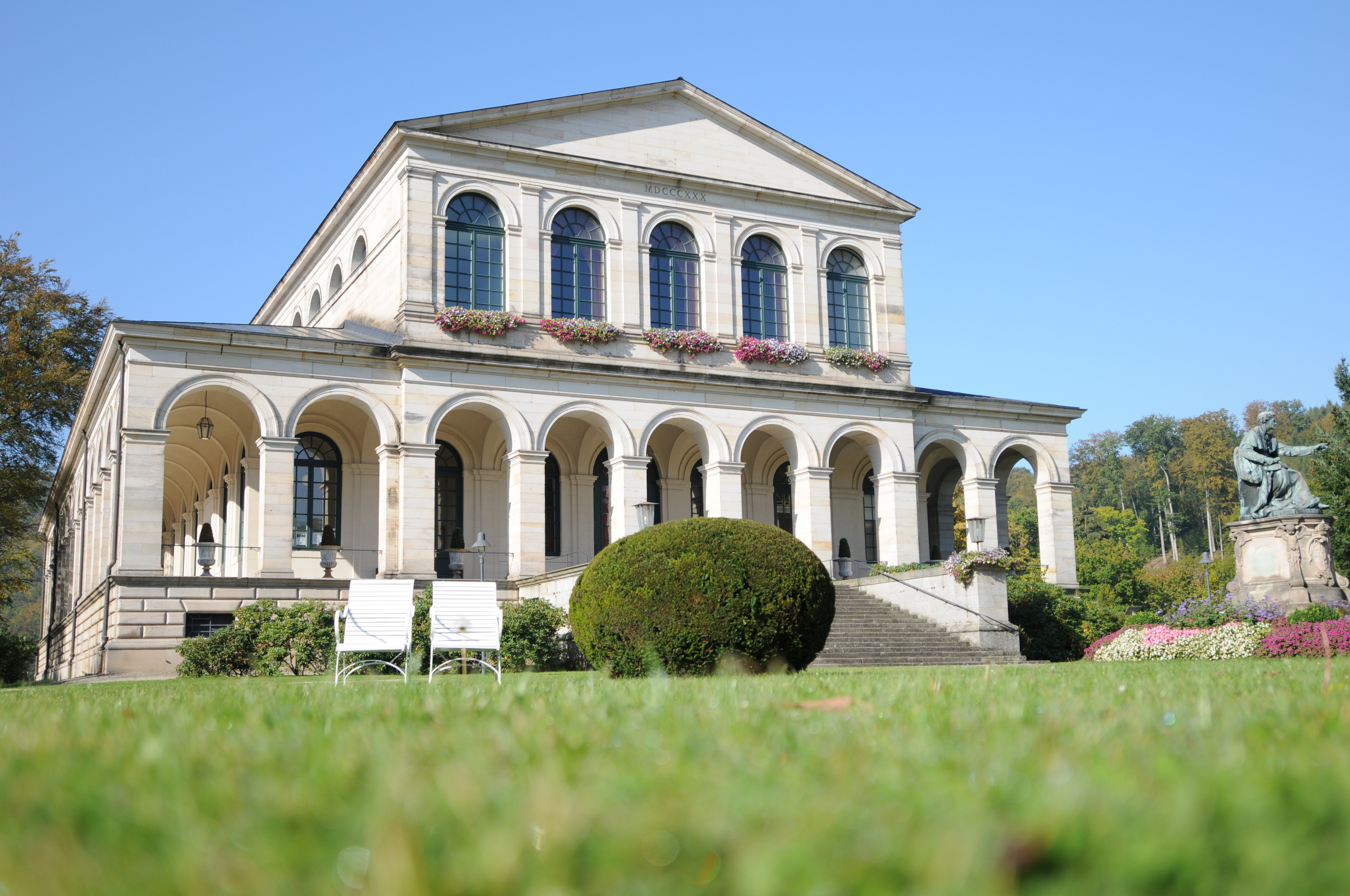 Kursaalgebäude im Staatsbad Bad Brückenau